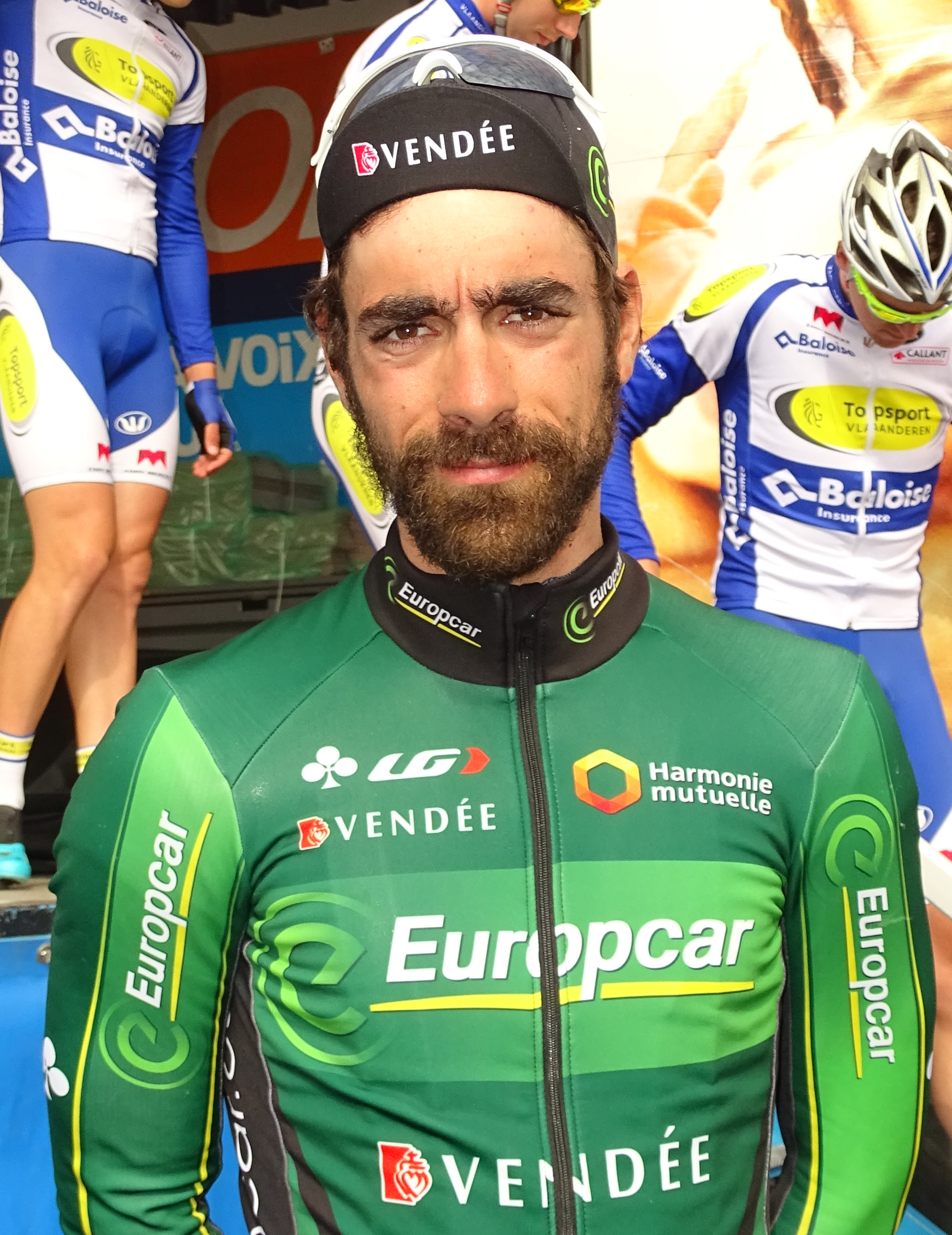 Reportage réalisé le jeudi 16 avril à l'occasion du départ et de l'arrivée du Grand Prix de Denain 2015 à Denain, Nord, Nord-Pas-de-Calais, France.